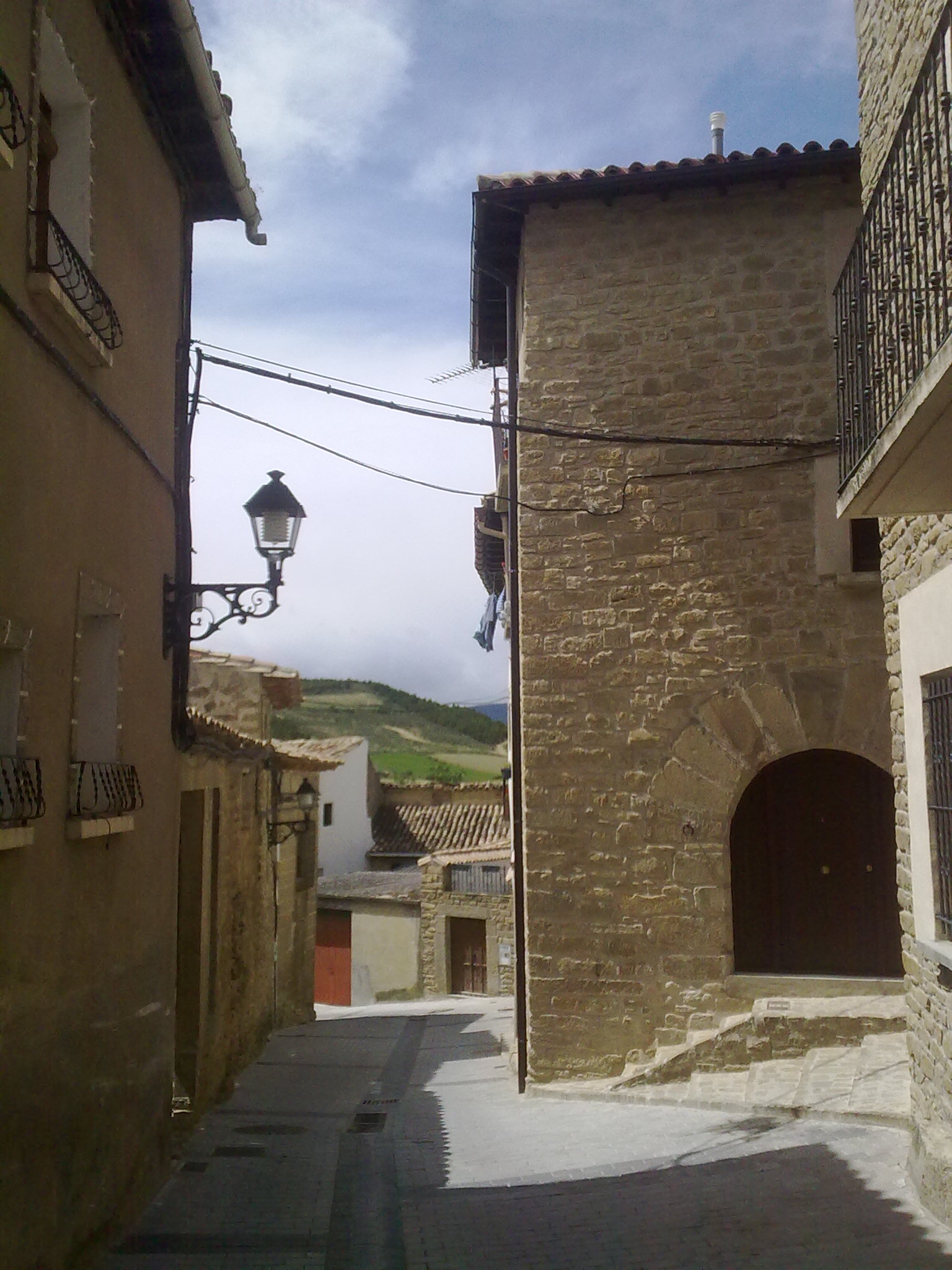 Oibarko Andra Mari karrikaren ikuspegia.